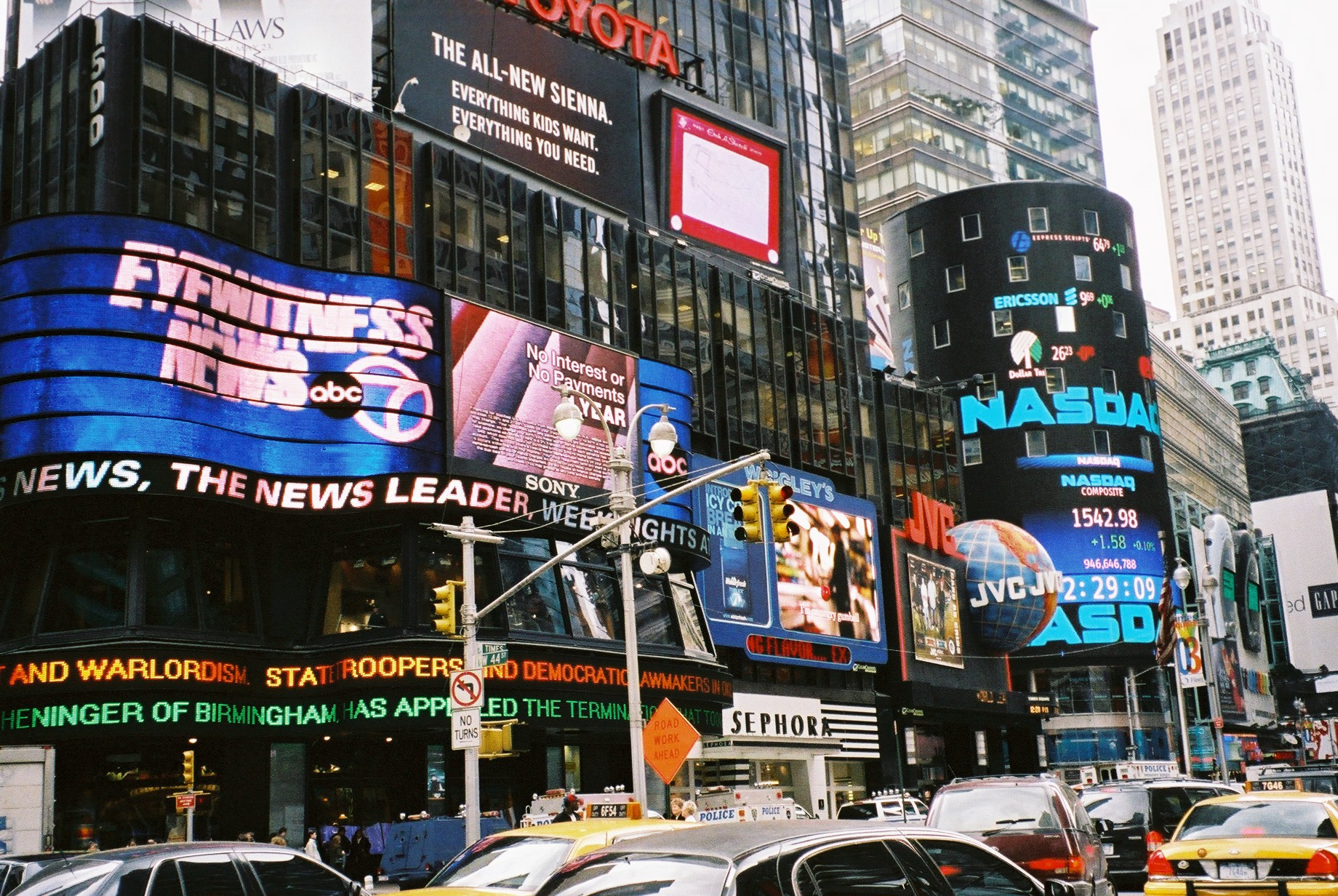 Times Square in Manhattan, NYC